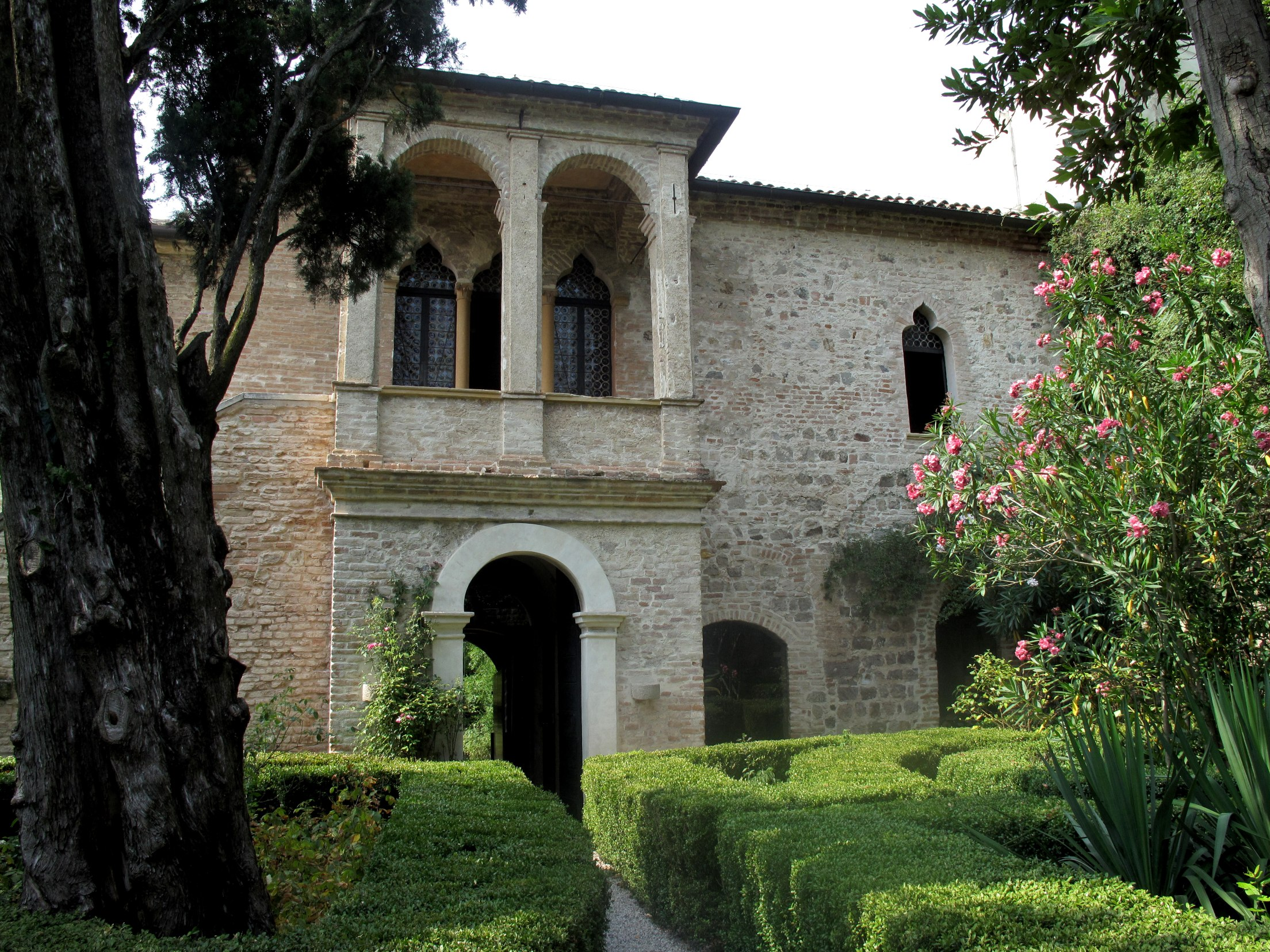 Arqua Petrarca 25